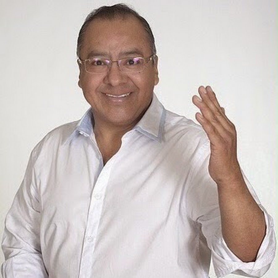 Imagen de candidato independiente a la jefatura delegacional de Gustavo A. Madero